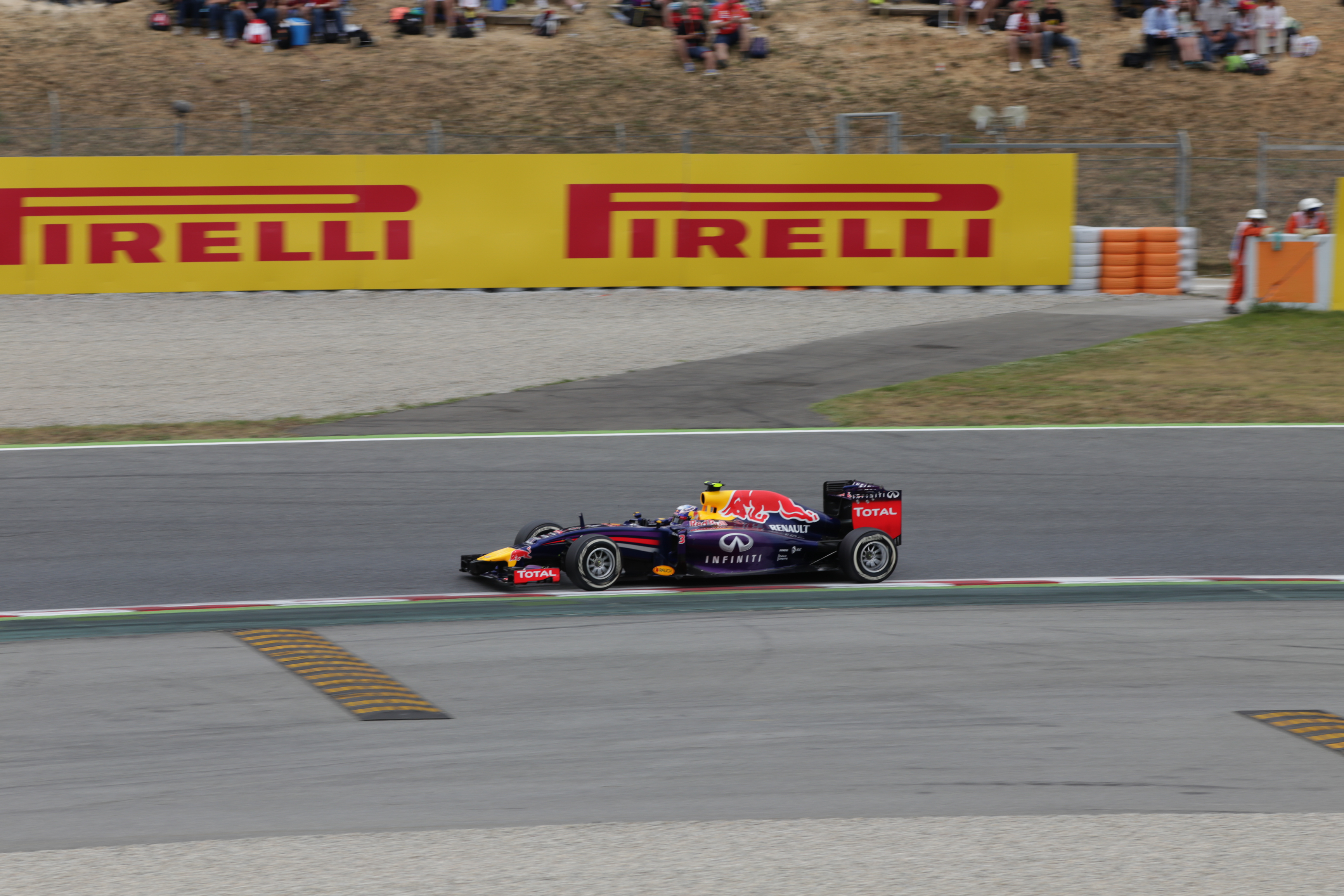 Daniel Ricciardo